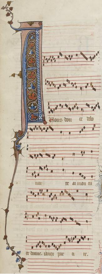 Paris, Bibliothèque Nationale, fonds français 146